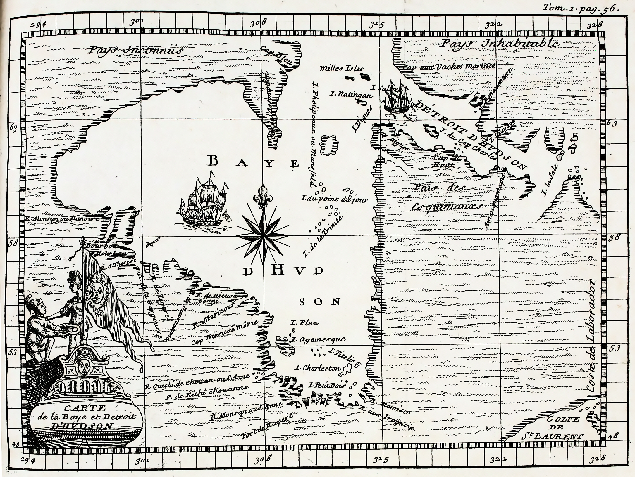 Carte publiée en 1722 dans dans l'Histoire de l'Amérique septentrionale, par Claude-Charles Bacqueville de La Potherie, Paris. En haut à droite : vaisseau français qui arrive dans la baie d'Hudson. En bas à gauche, près de la petite croix entre le navire et la côte : lieu de la bataille de la baie d'Hudson en septembre 1697. Guerre de la Ligue d'Augsbourg.